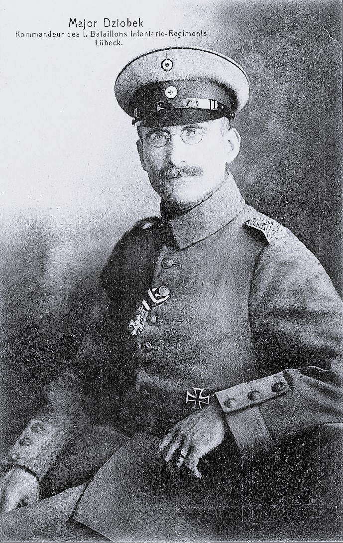 Majo Dziobek - Kommandeur des I. Bataillon des Infanterie-Regiments Lübeck